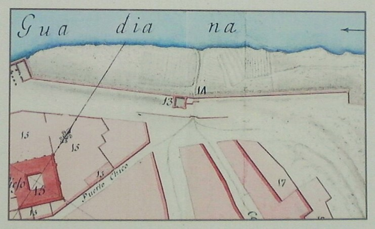 Plano de 1803 por Jose de Gabriel. La Puerta de Pajaritos está marcada con el n.º 14.